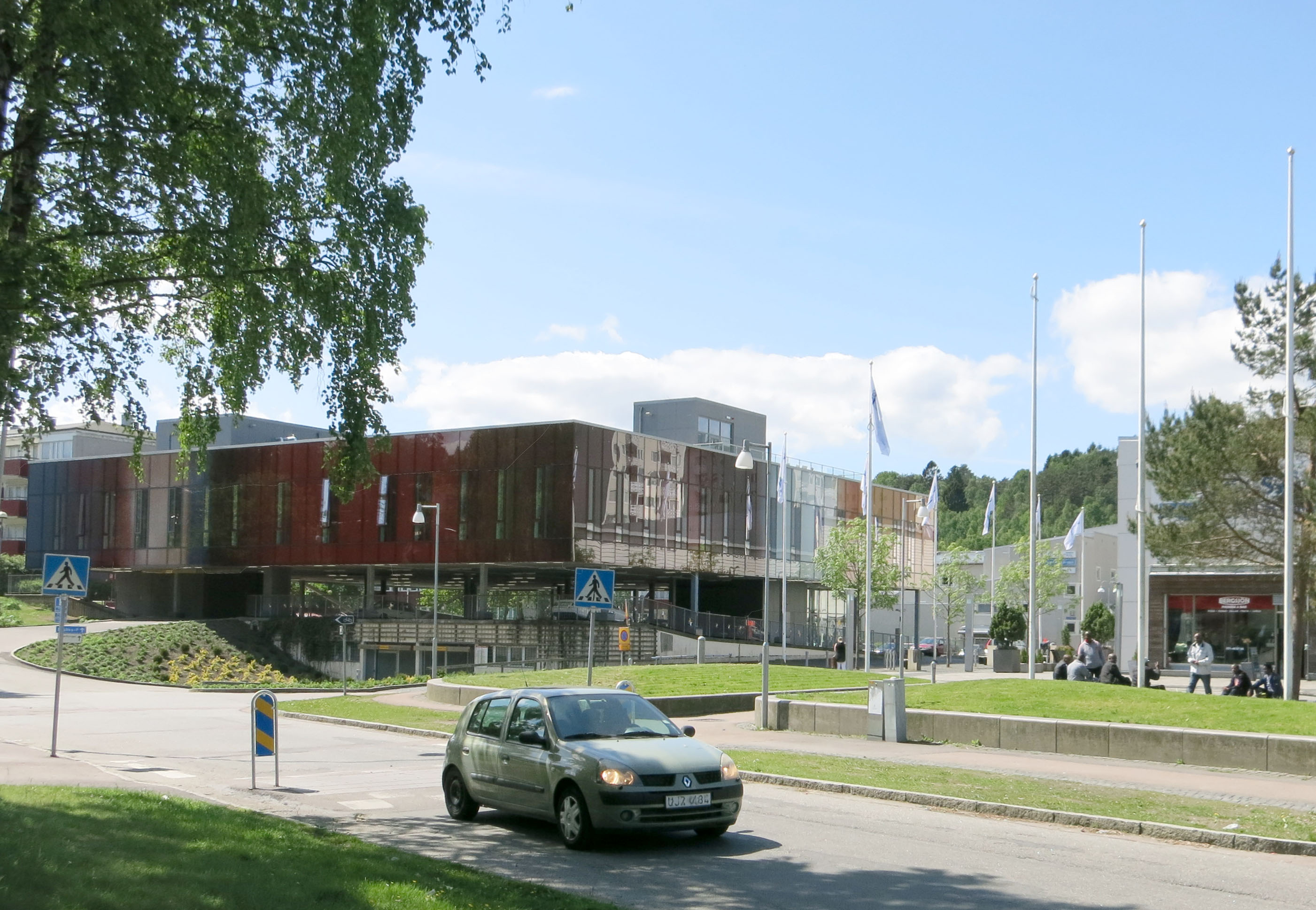 Vårdcentralen Rymdtorget Bergsjön Göteborg